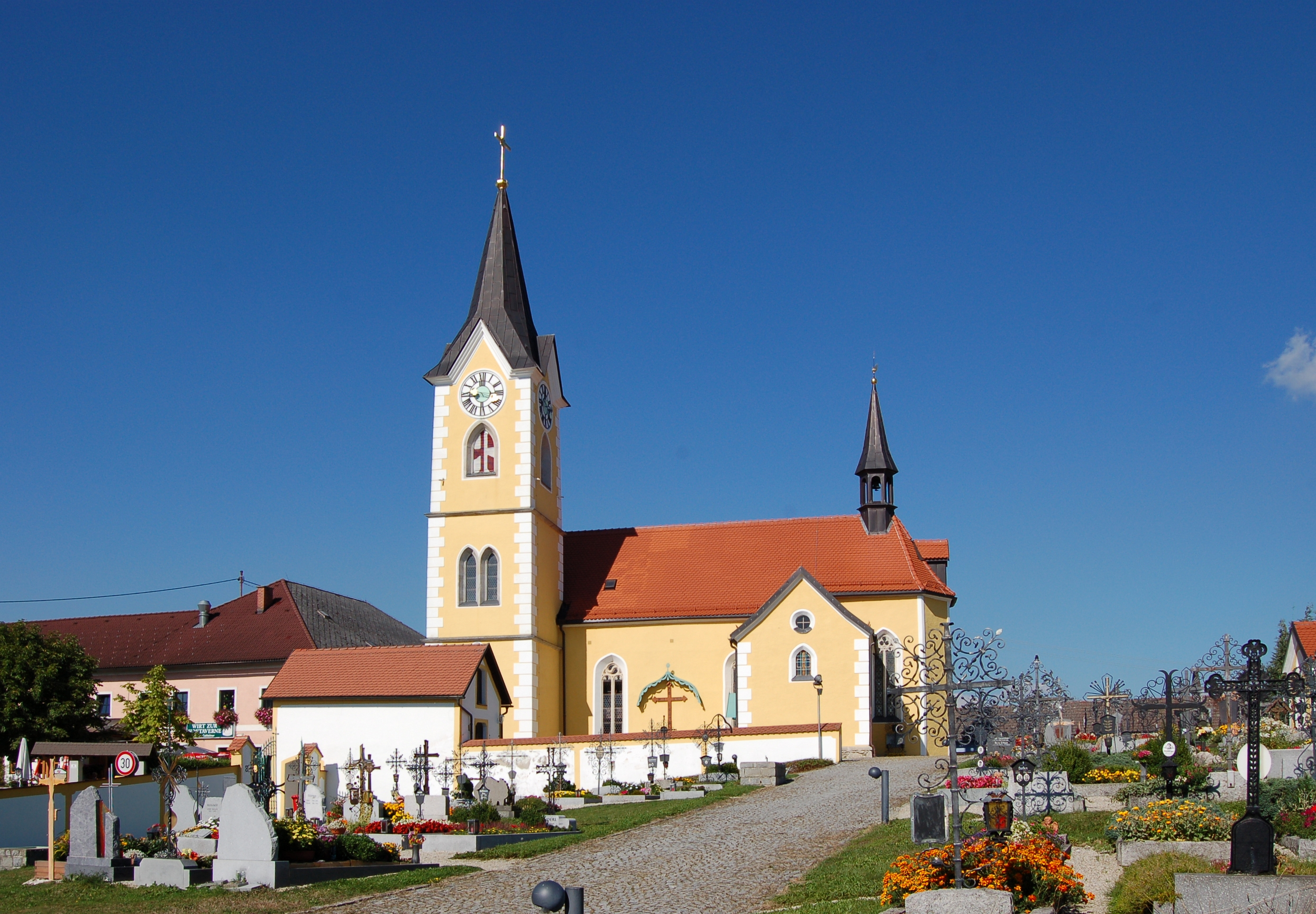 Die ehemals mittelalterliche Kapelle von Herzogsdorf wurde zwischen 1877 und 1878 zu einer schmalen, fünfjochigen neogotischen Kirche mit Kreuzippengewölben umgebaut und mit neogotischem Inventar ausgestattet. Der Hochaltar stammt aus der Werkstätte von Josef Kepplinger. The making of this work was supported by Wikimedia Austria. For other files made with the support of Wikimedia Austria, please see the category Supported by Wikimedia Österreich.